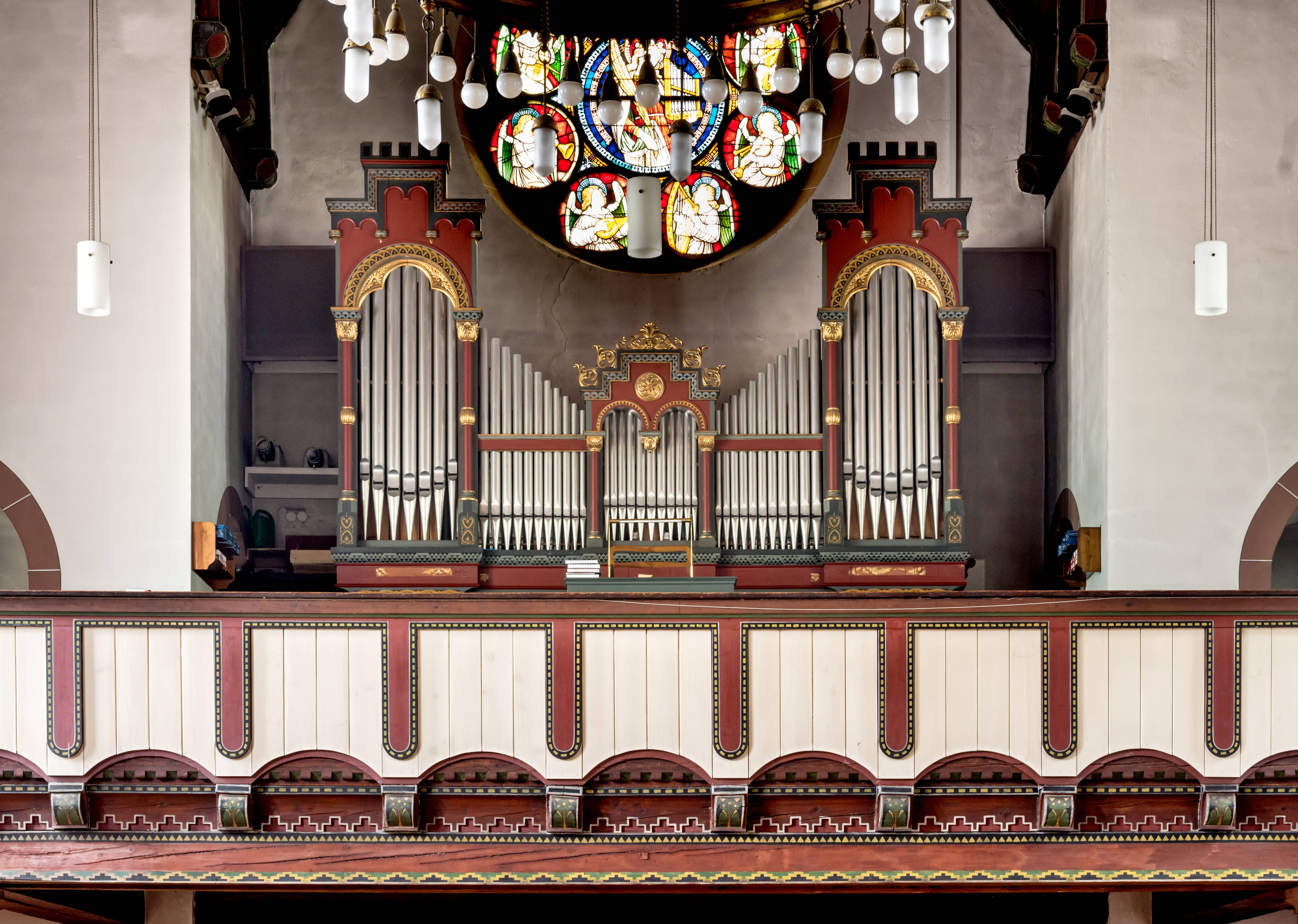 Bilder von der Kirche St Antonius in Schuttertal Die Orgel